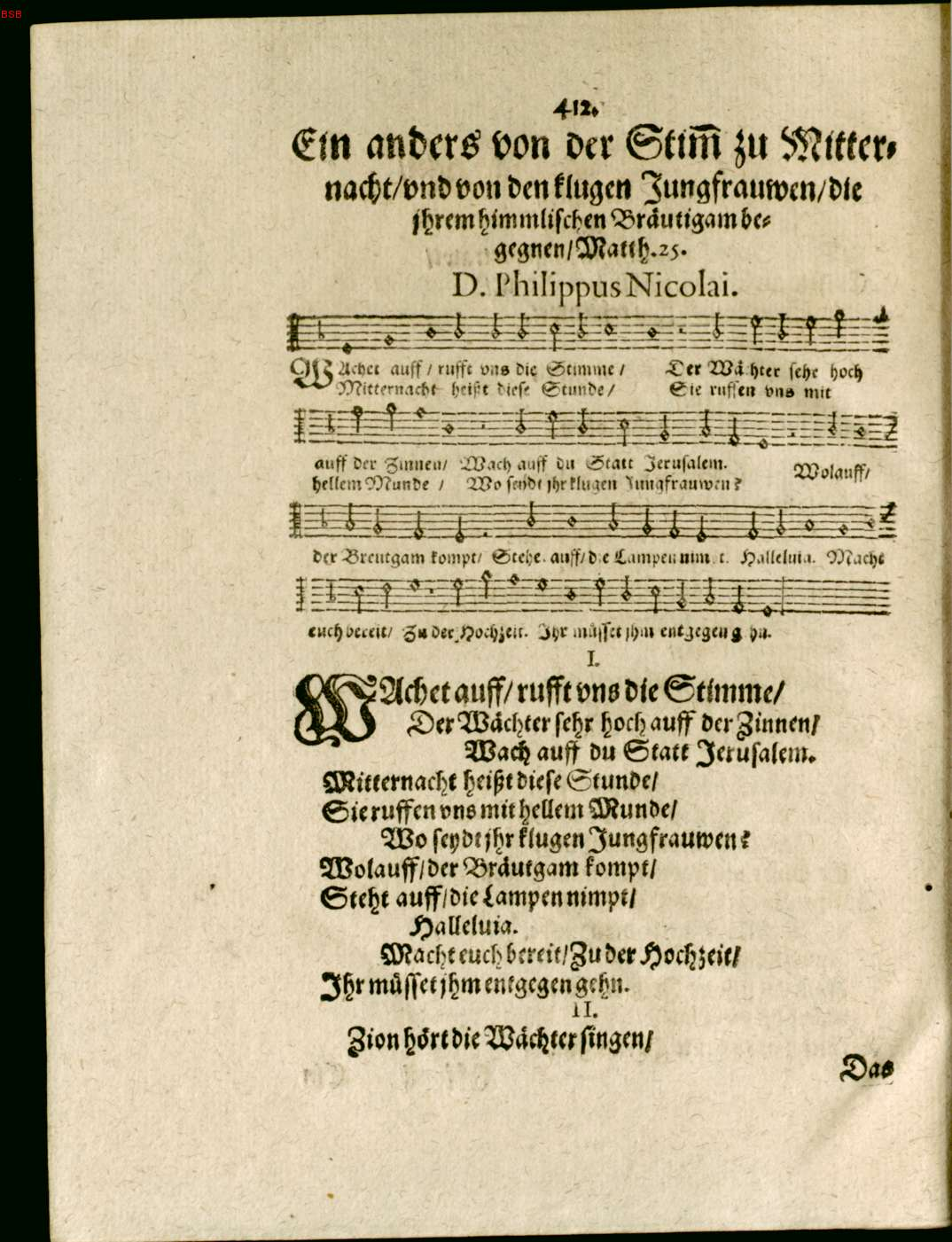 Scan from Freudenspiegel deß ewigen Lebens p. 412